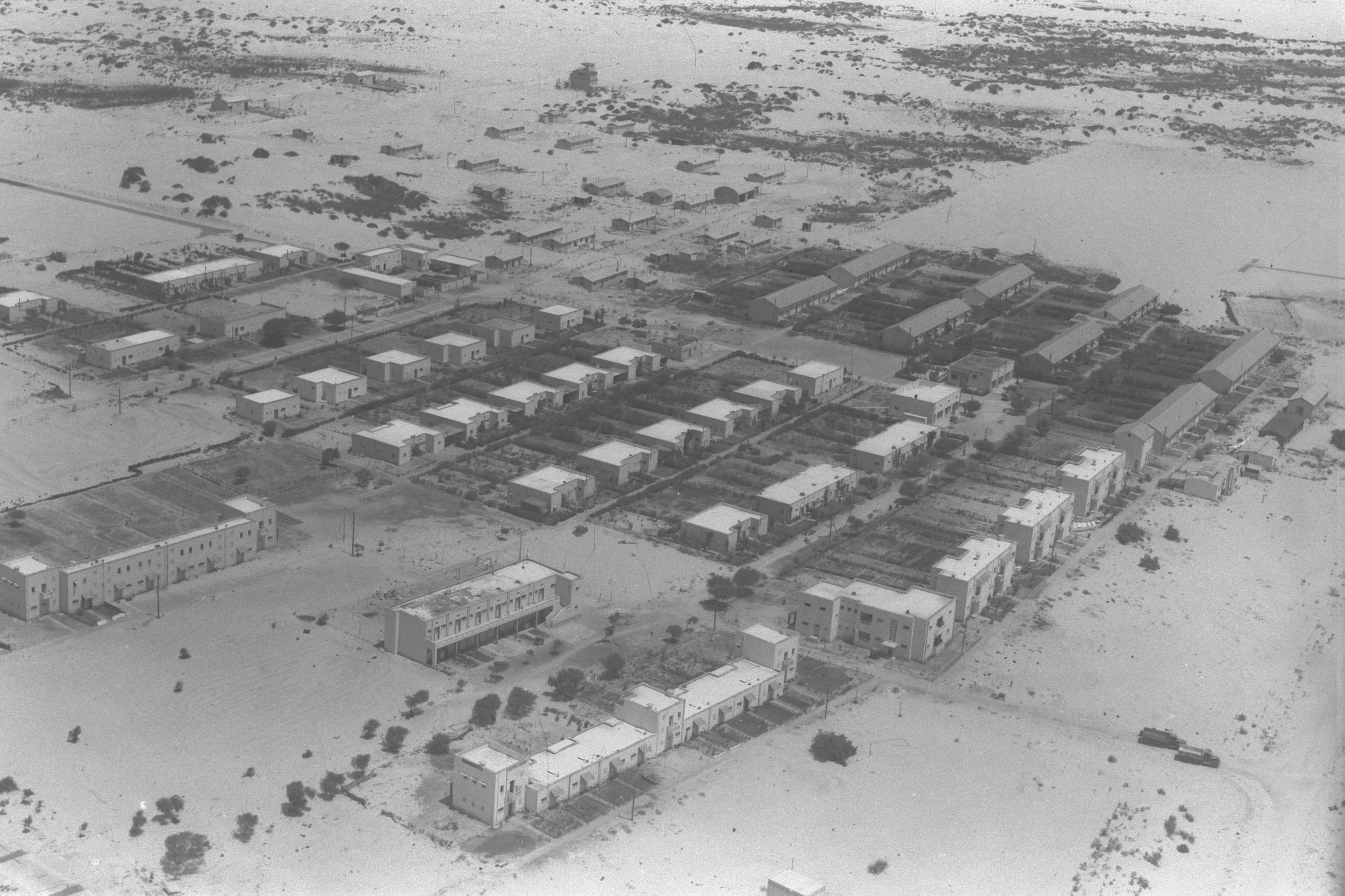 תצלום אוויר של קרית ים בשנת 1949